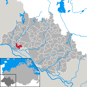 Besitz in Mecklenburg-Vorpommern - district Ludwigslust